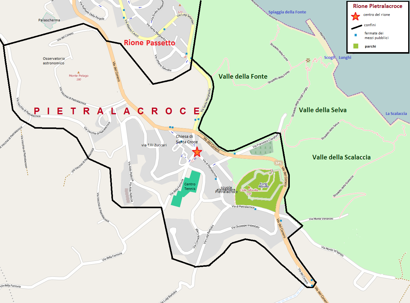 Mappa del quartiere Pietralacroce di Ancona, con i confini, le vie, le piazze e i parchi.